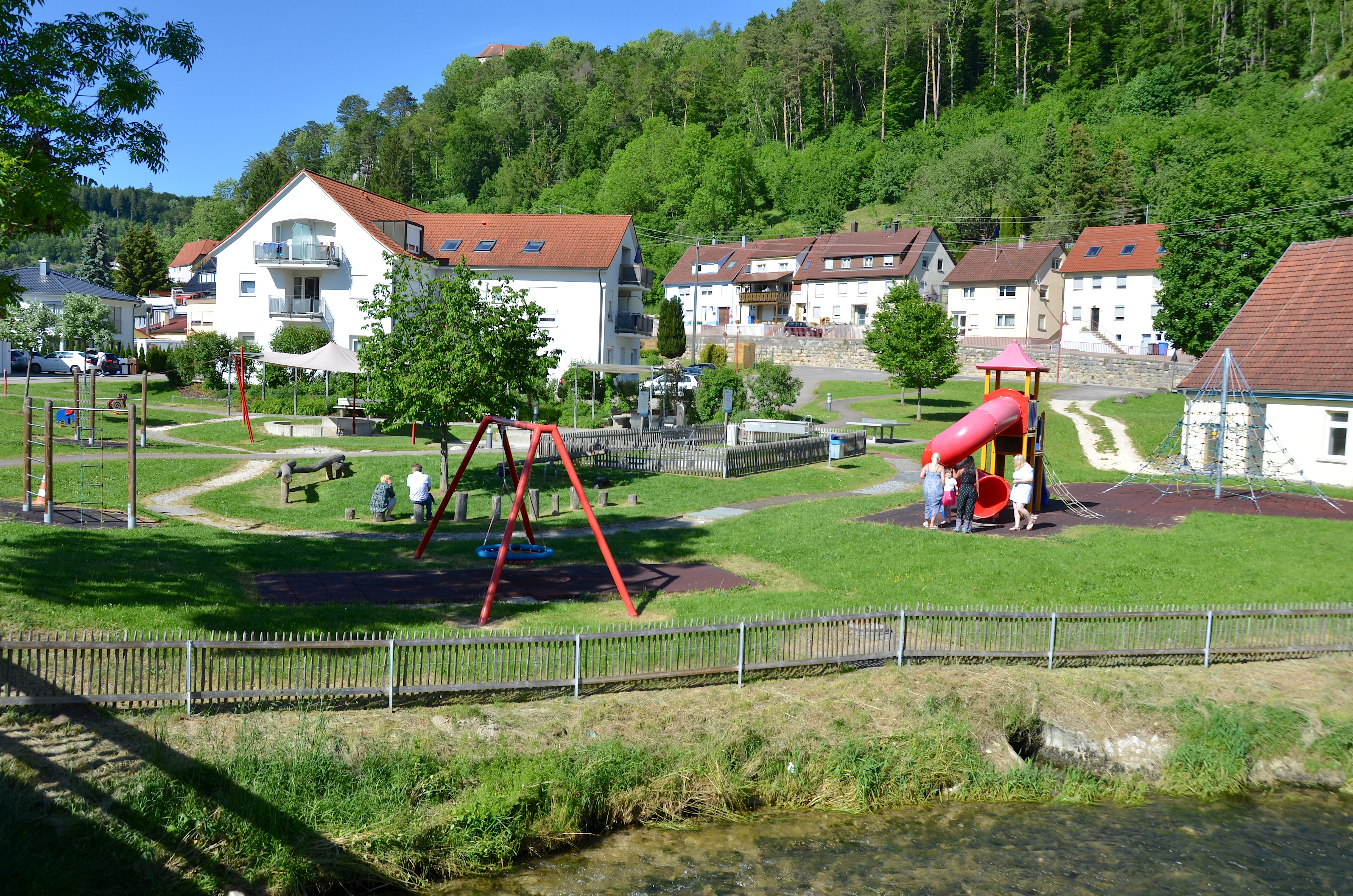 Bürgerpark Straßberg mit Kneipp-Becken und Barfußpfad (2019)